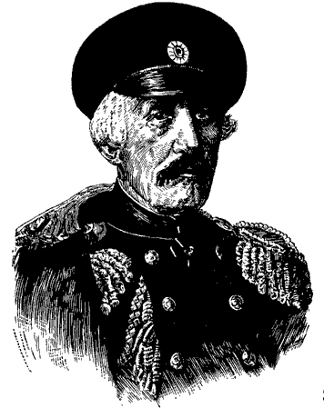 Портрет известного русского офицера, путешественника Фёдора Фёдоровича Торнау (1810-1890)